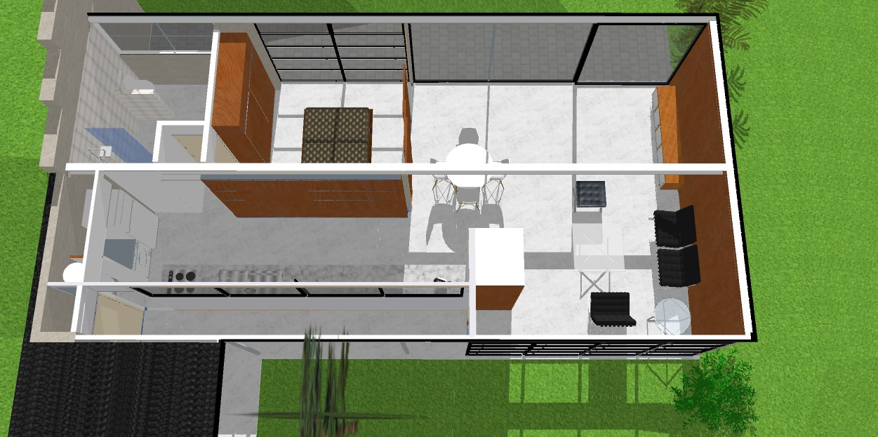 modélisation du plan meublé